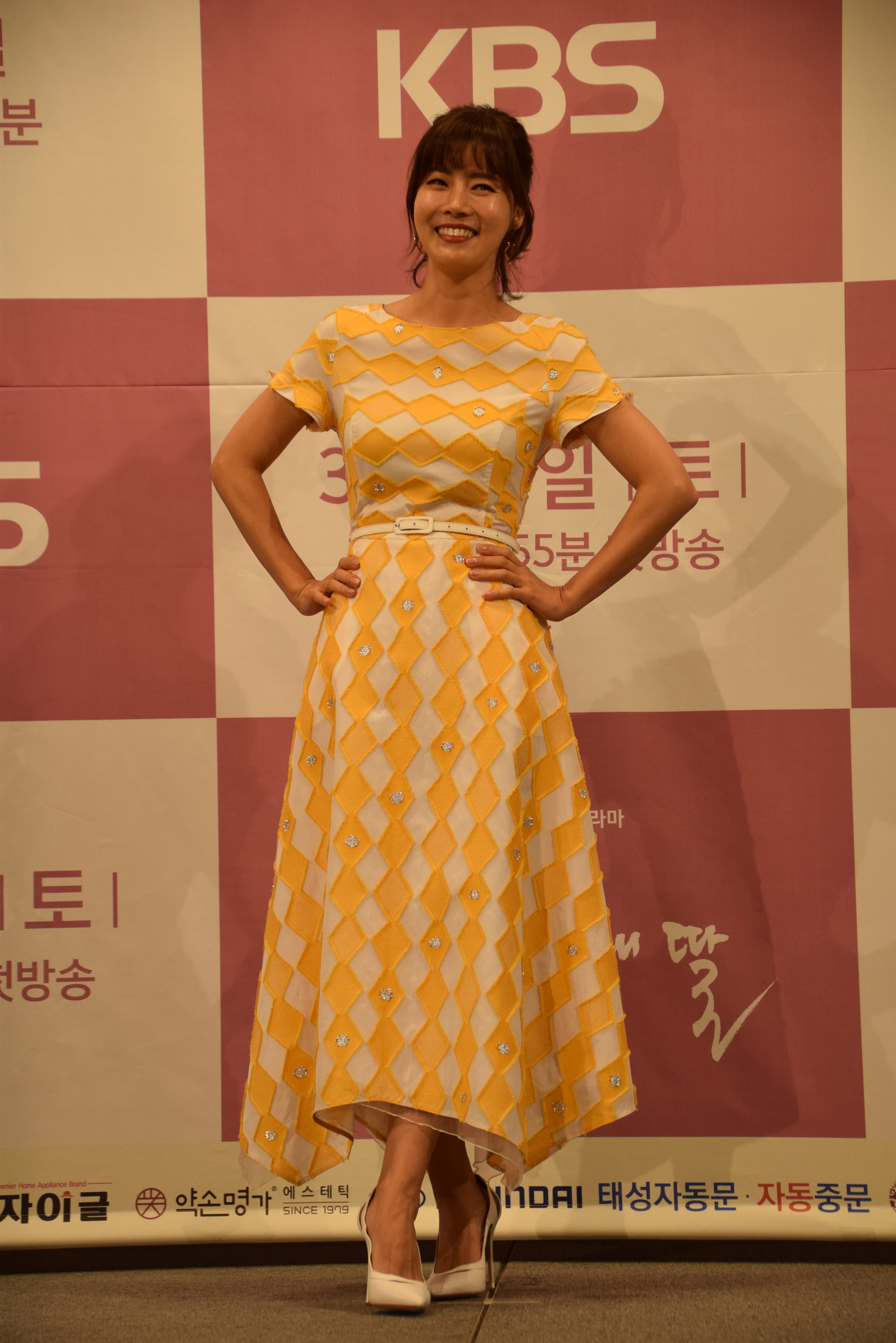 2019년 3월 19일 서울 강남구 임피리얼팰리스호텔 셀레나홀에서 열린 KBS 2TV 새 주말드라마 '세상에서 제일 예쁜 내 딸' 제작발표회장에서의 유선